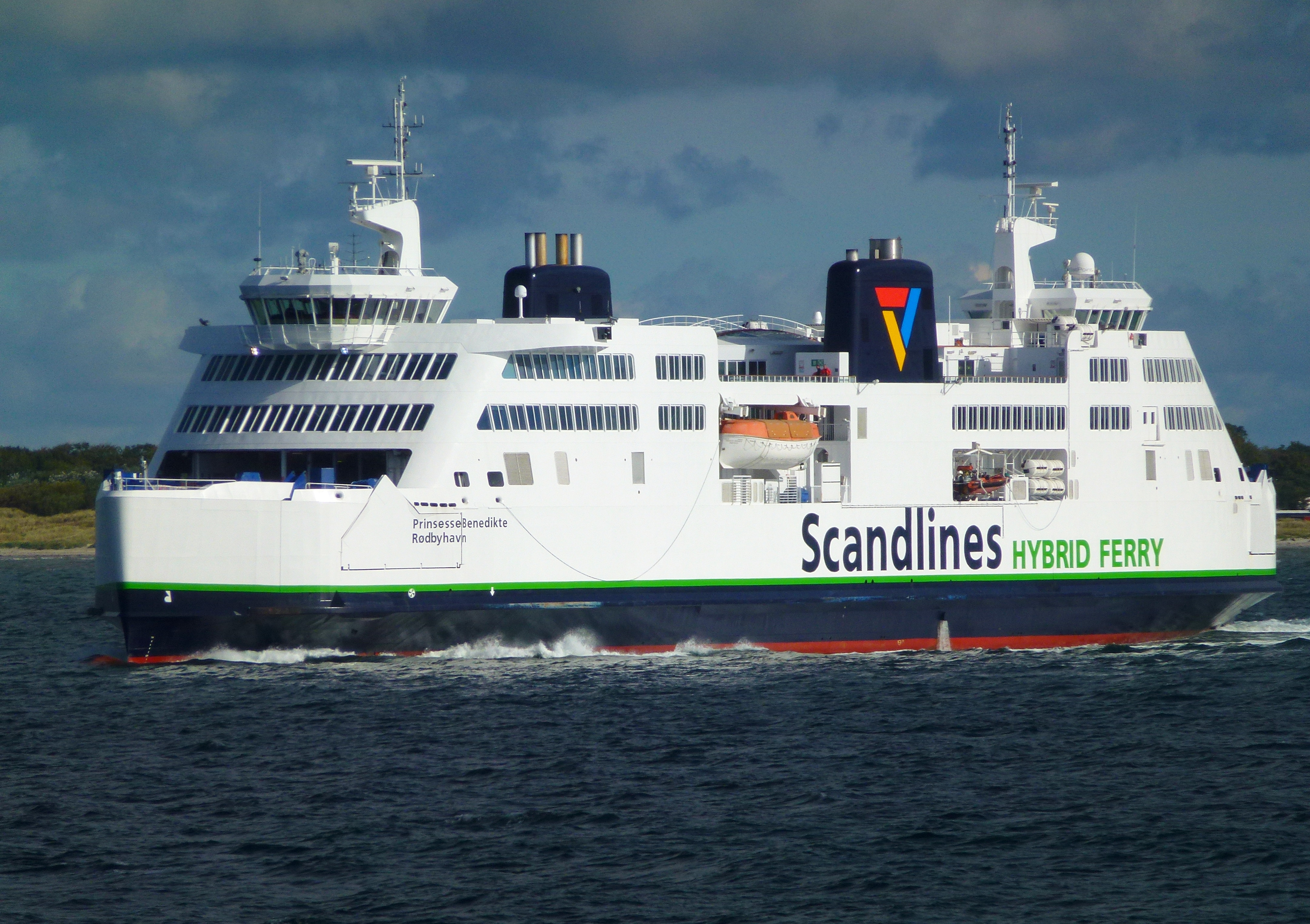 Bil- och tågfärja Princessan Benedike